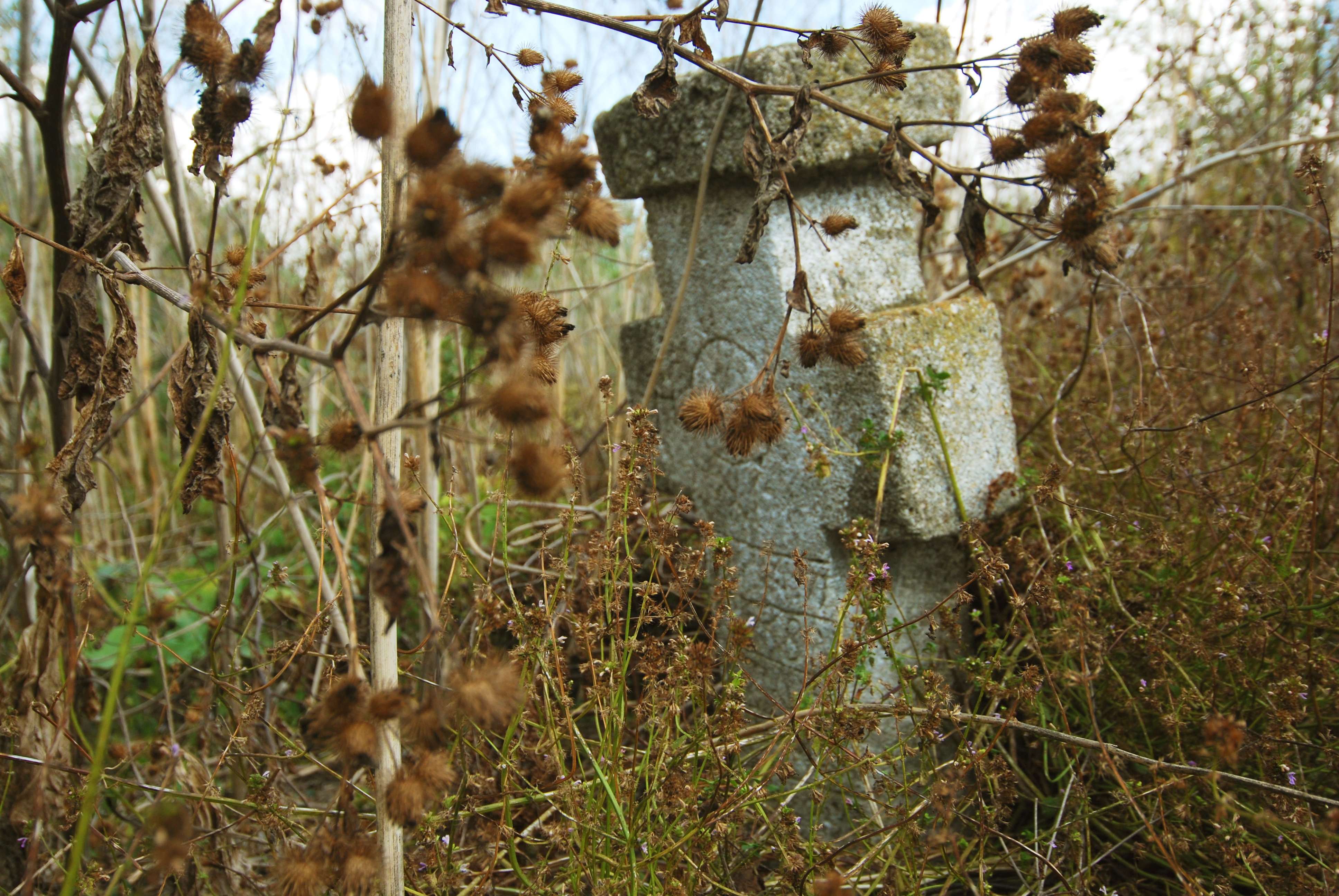 asamblu de cruci datând din sec. XVIII-XX, localizate în extremitatea estică a satului.